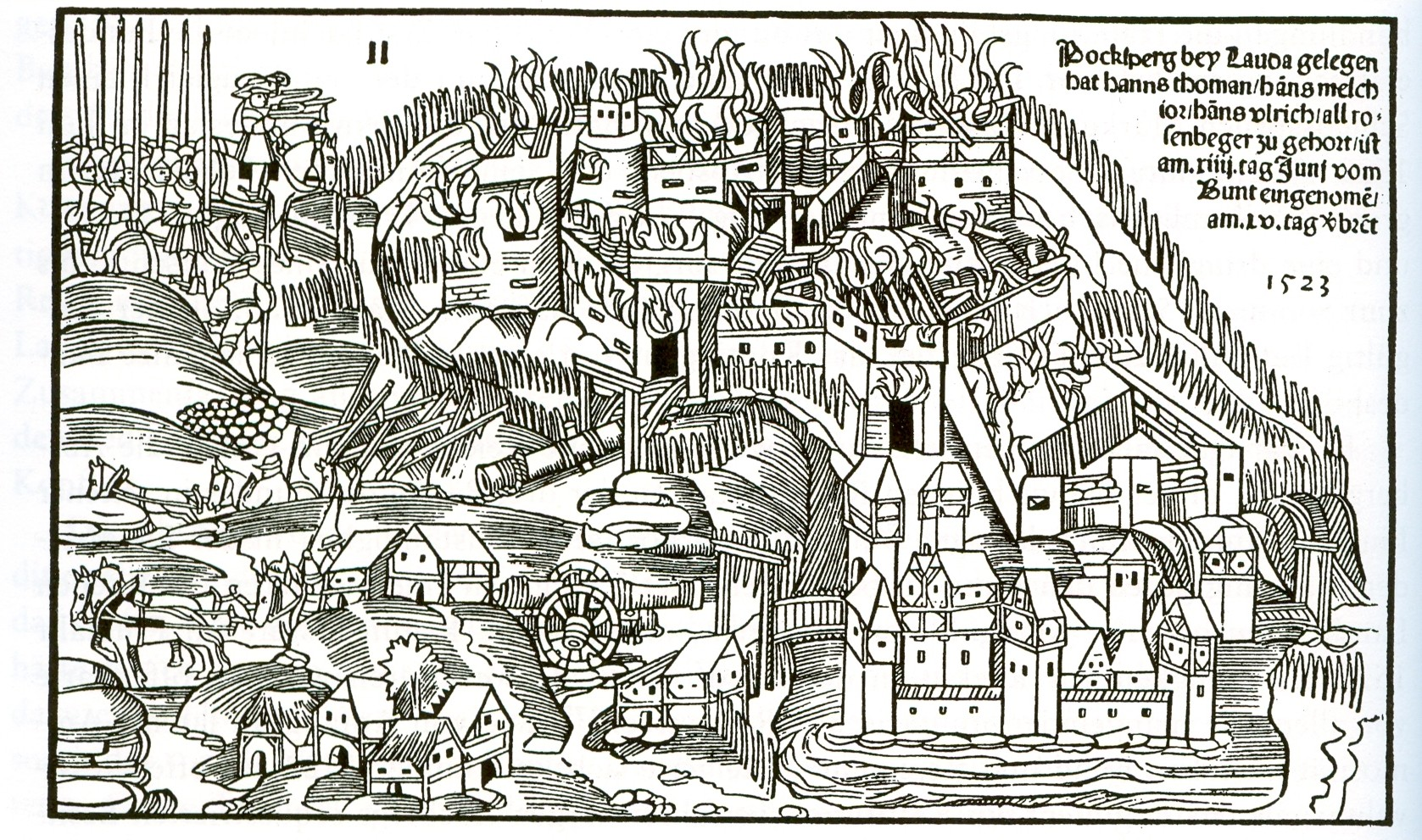 Einnahme und Niederbrennung des Schlosses Boxberg, des Stammsitzes der Rosenberg durch den Schwäbischen Bund 1523 Holzschnitt, eingescannt aus: Horst Carl: Der Schwäbische Bund 1488 - 1534; Landfrieden und Genossenschaft im Übergang von Spätmittelalter zur Reformation; Leinfelden-Echterdingen, 2000; ISDN 3-87181-424-5, S. 478